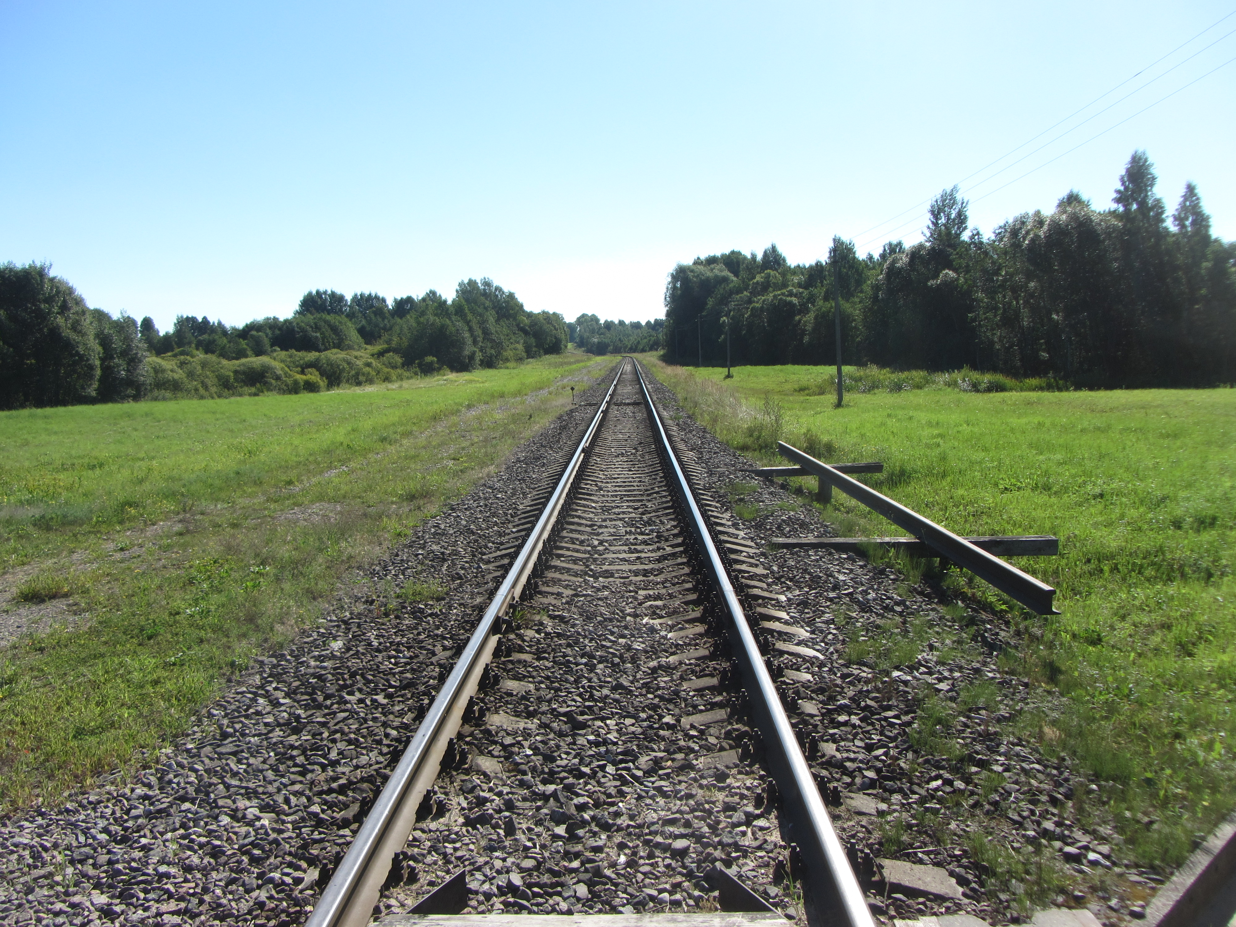 Obelių sen., Lithuania